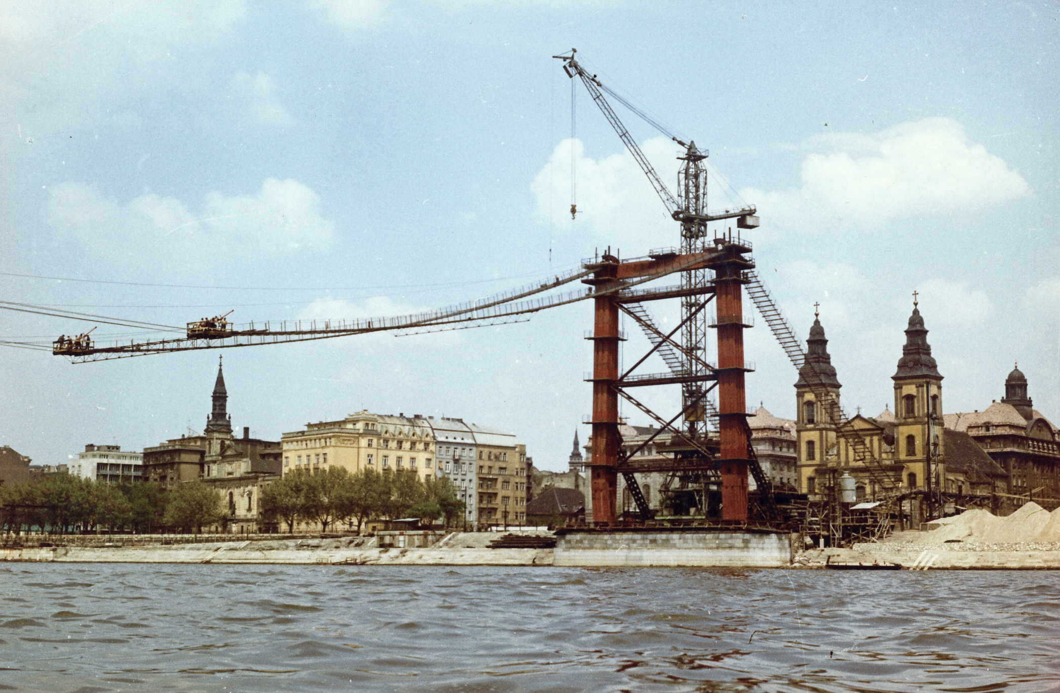 az Erzsébet híd építése a Dunáról a pesti hídfő felé nézve. Location: Hungary, Budapest Tags: colorful, construction, bridge building, picture, tower crane, church, steel structure Title: az Erzsébet híd építése a Dunáról a pesti hídfő felé nézve.